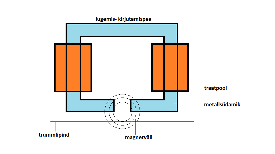 Magnetilise mälu lugemis- kirjutamispea põhimõtteline skeem